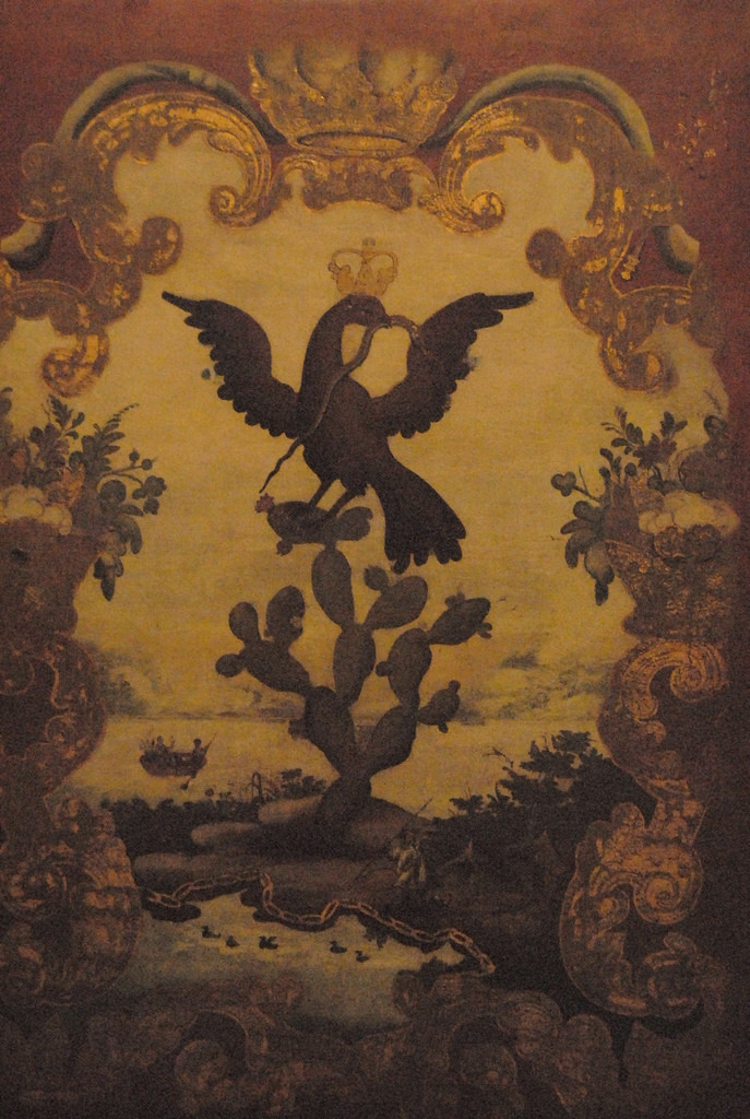 File:Carta Magna del Imperio Mexicano